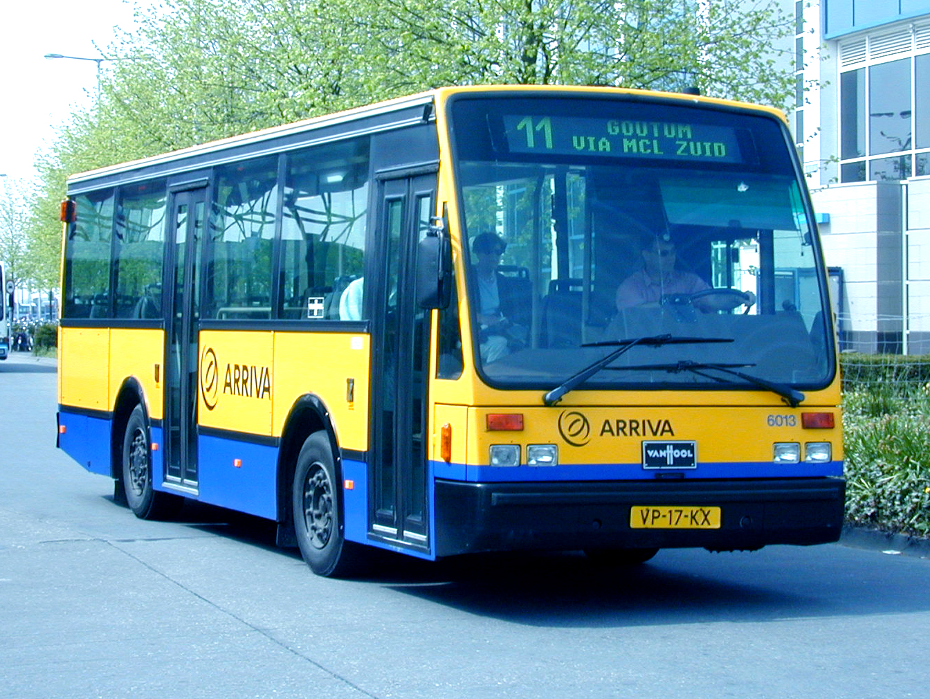 Arriva bus 6013 van het type Van Hool A508/DAF te Leeuwarden. Deze bus werd oorsprongkelijk door DVM aangeschaft voor de omgeving Emmen.